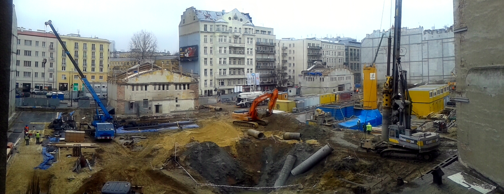 Hala na Koszykach w trakcie "remontu"